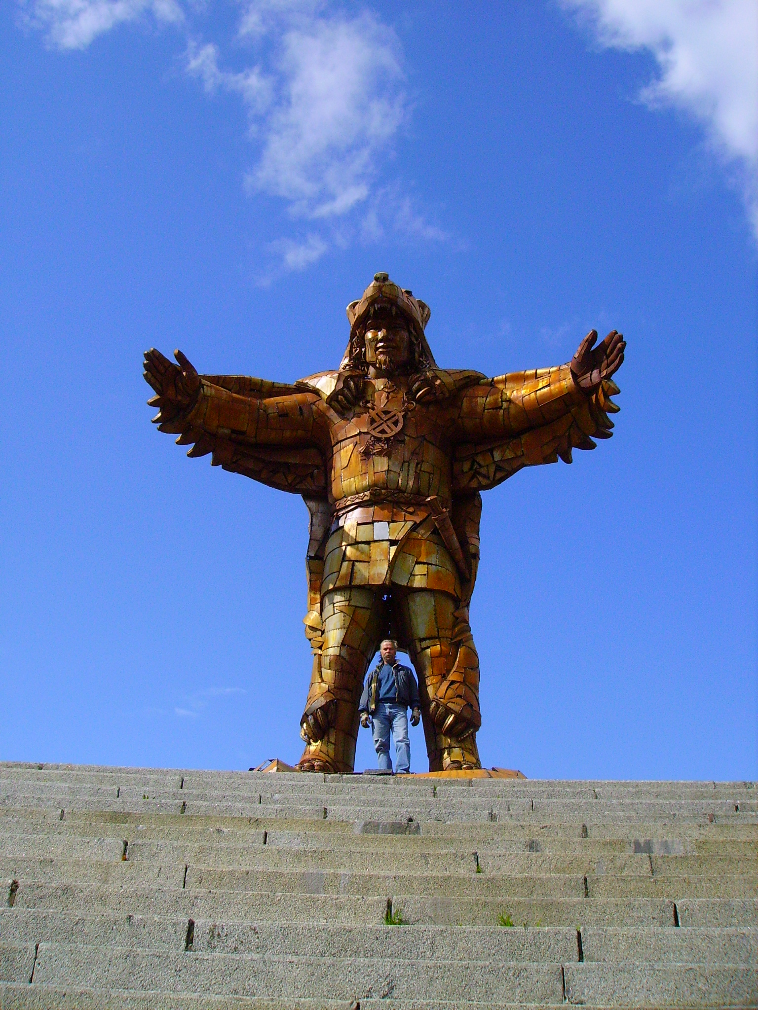 Elo Liivi monumentaalne terasskulptuur "Kalev" 2006. aastal Tallinna Linnahalli katusel.